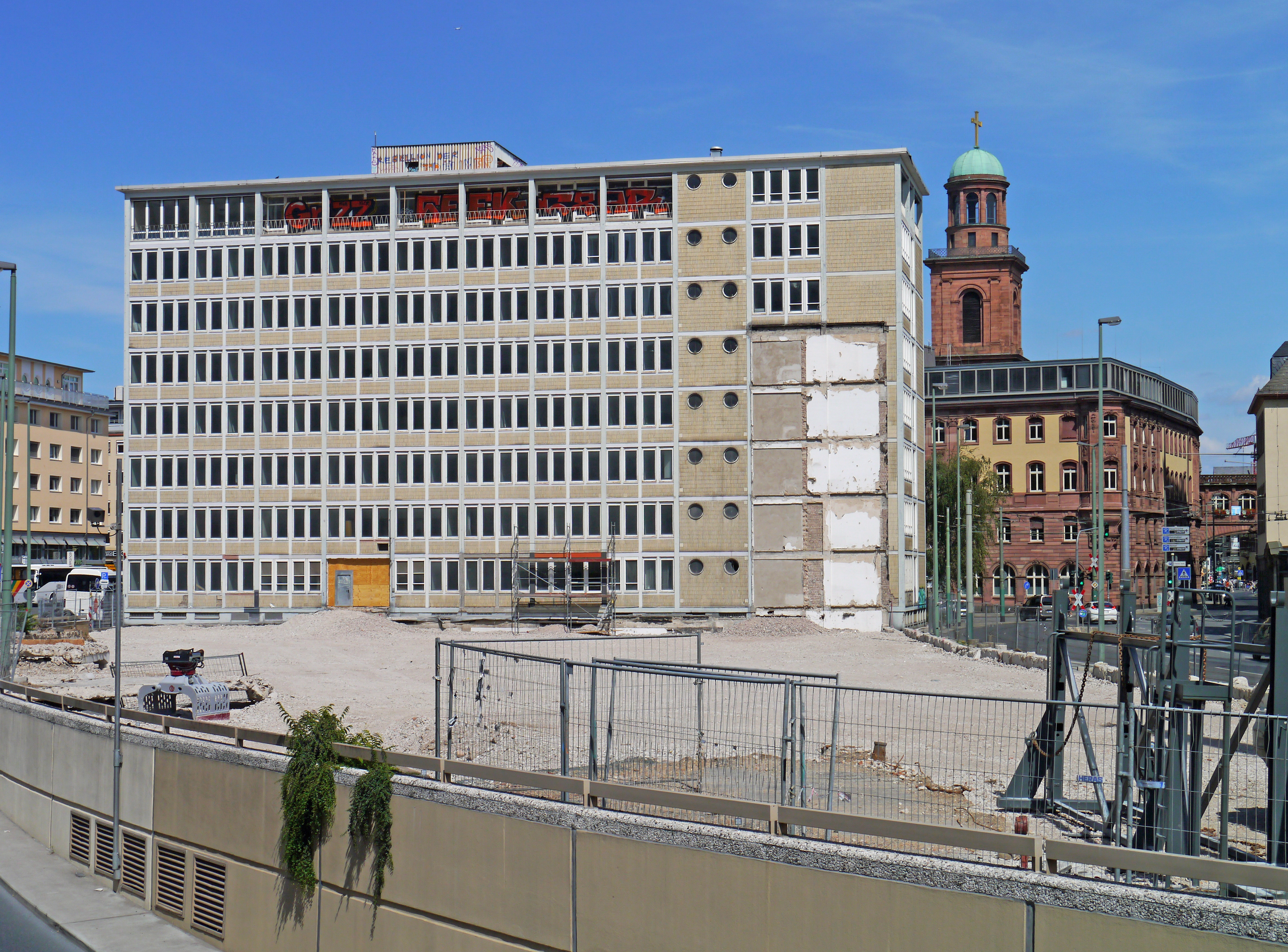 Der Rest des ehemaligen Bundesrechnungshofs, 2015 zwischen Berliner Strasse und Bethmannstrasse in Frankfurt am Main.